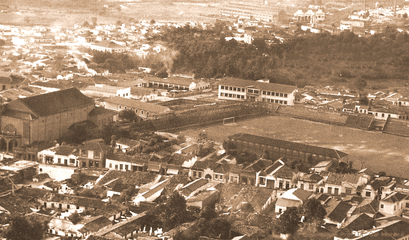 Vista Aérea Estádio Humberto Reale - década 1940